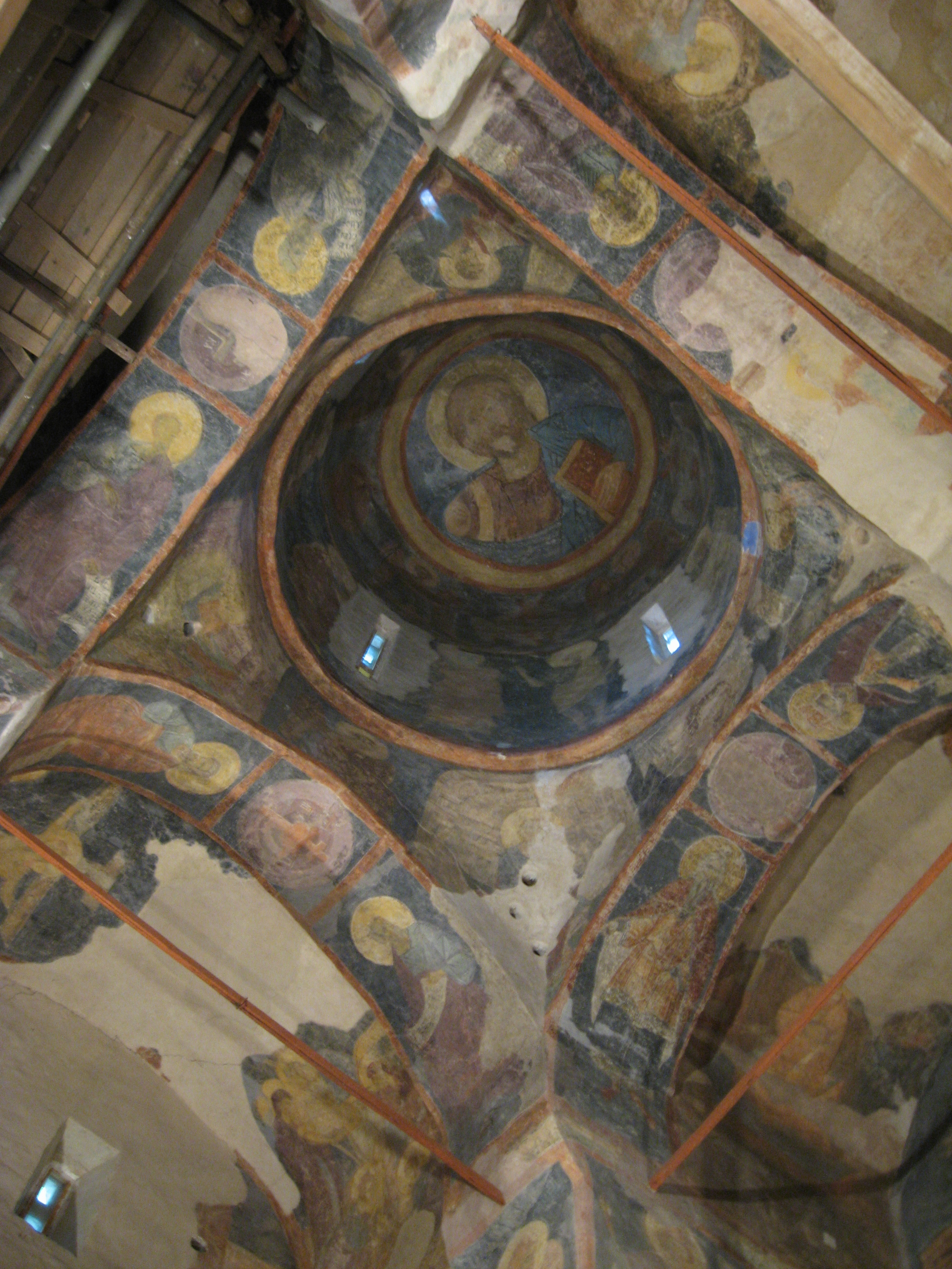 Интерьер с фресками церкви Рождества Христова в Великом Новгороде.